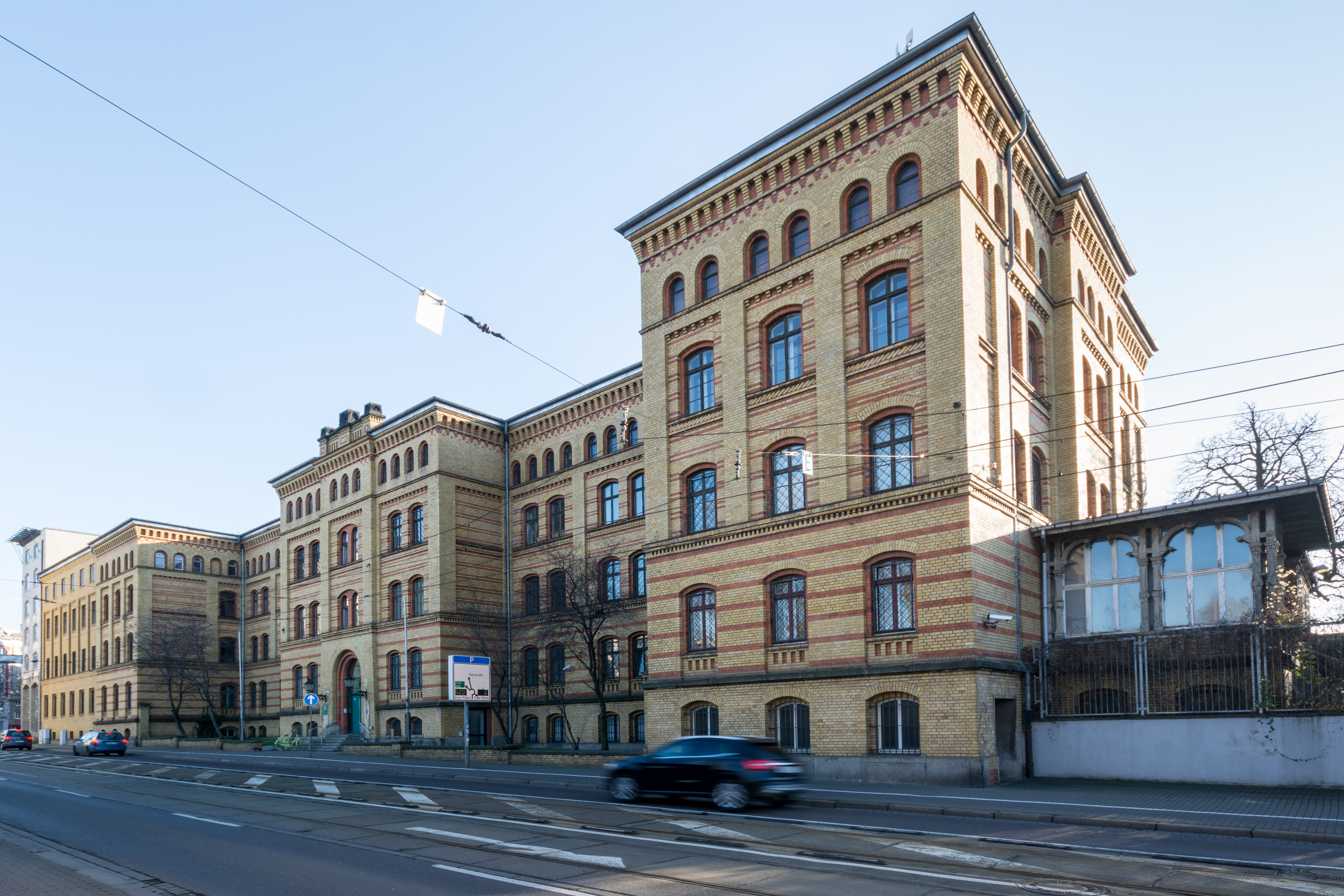 Ehemaliges Kasernengebäude Hallische Straße 3 in Magdeburg-Altstadt. This is a photograph of an architectural monument. 70955